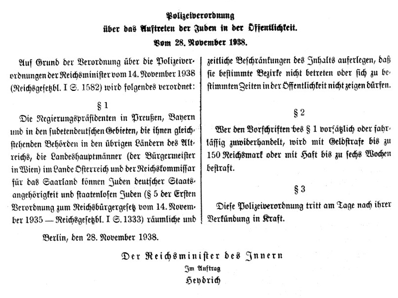 Polizeiverordnung über das Auftreten der Juden in der Öffentlichkeit von 1938, Verkündung im Reichsgesetzblatt